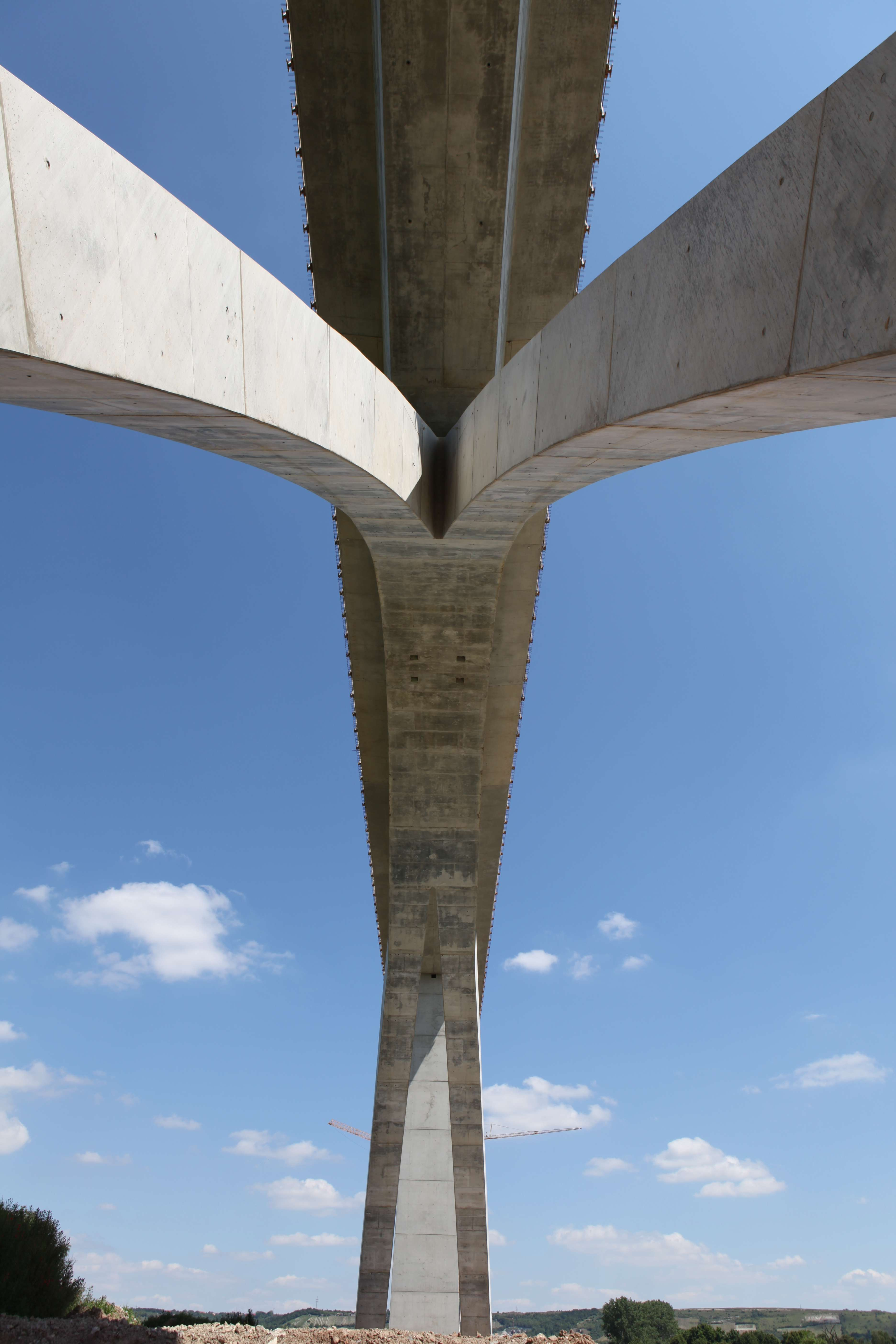 Unstruttalbrücke bei Karsdorf in Sachsen-Anhalt